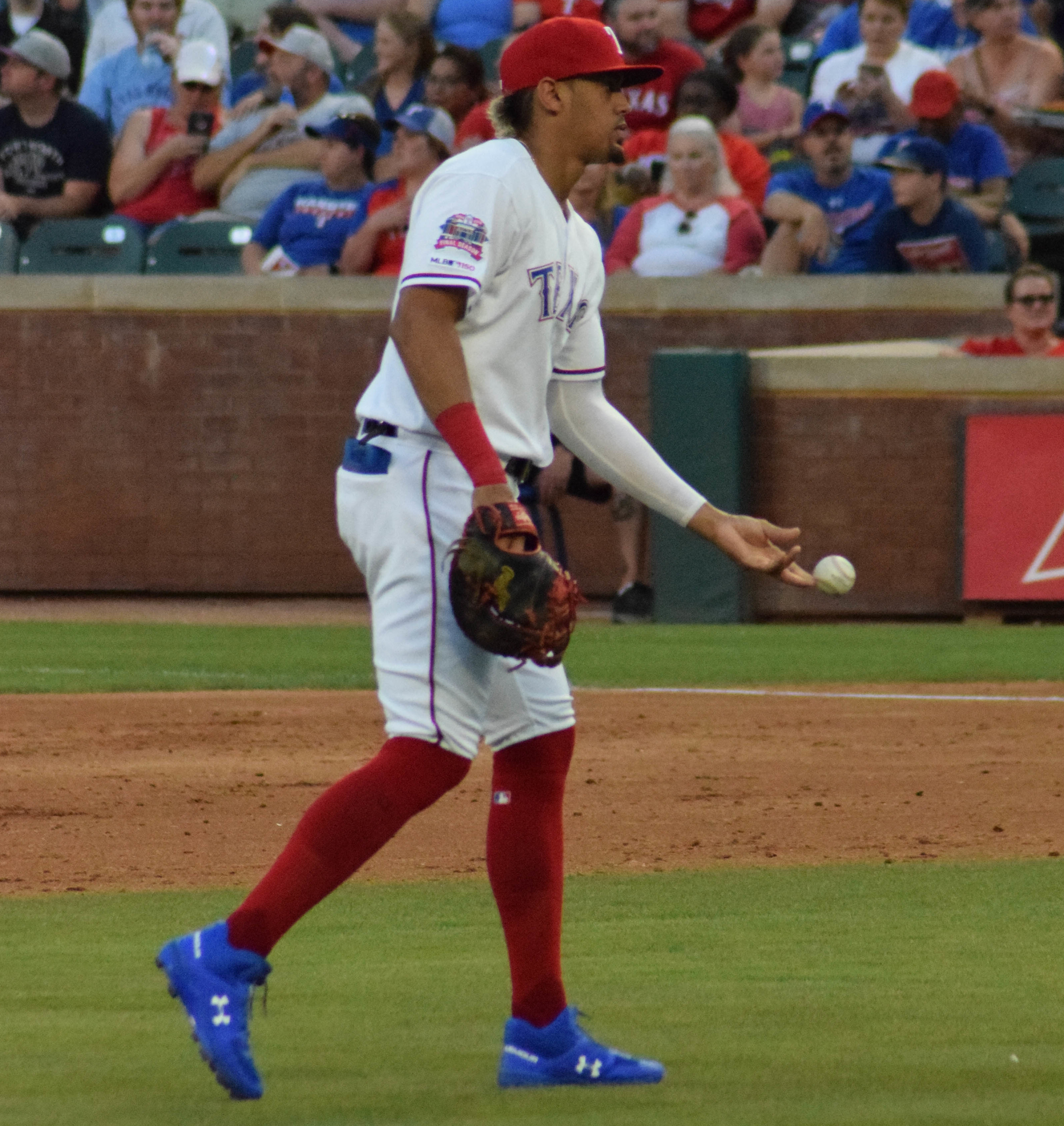 Ronald Guzmán